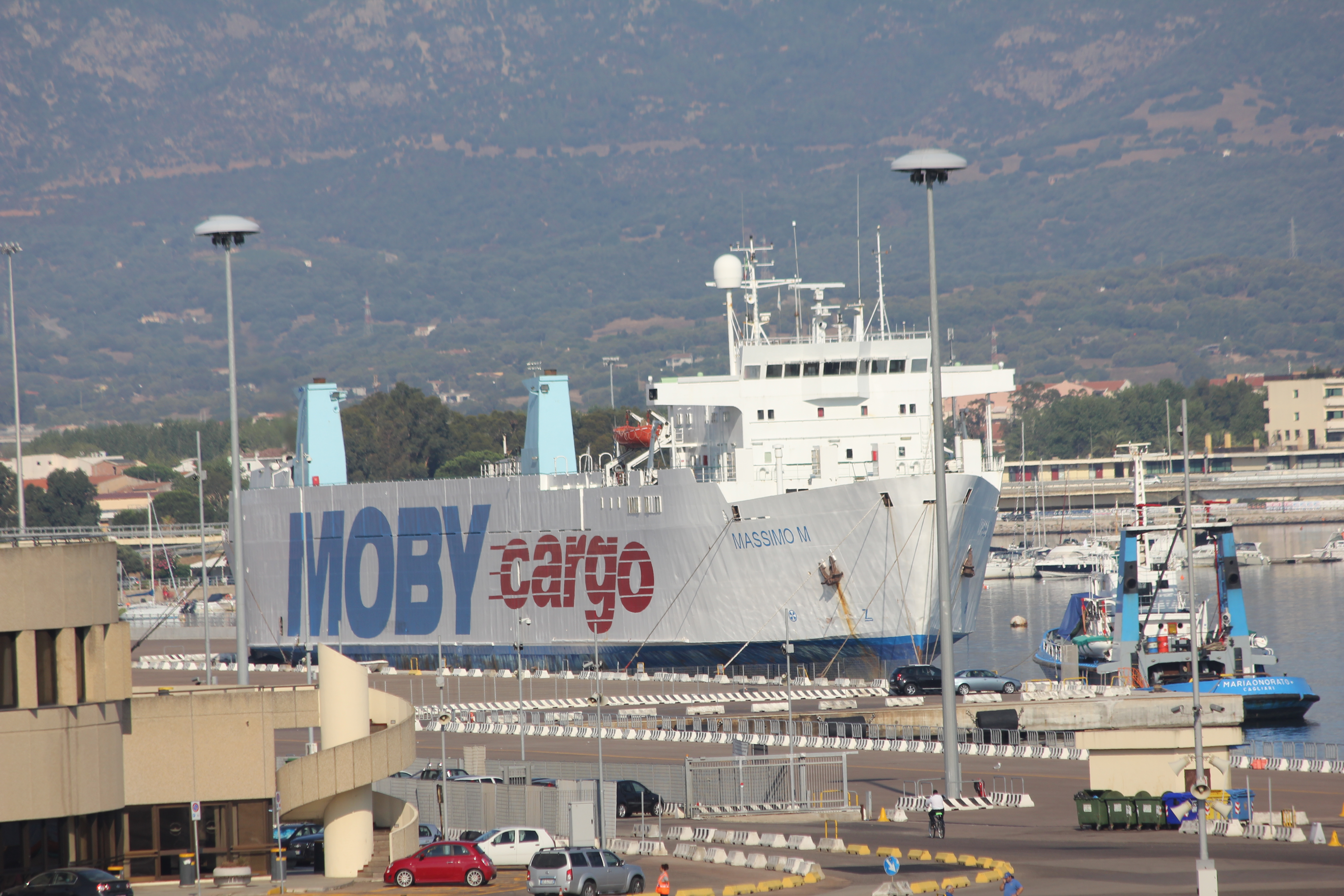 Il traghetto merci Massimo M in disarmo a Olbia